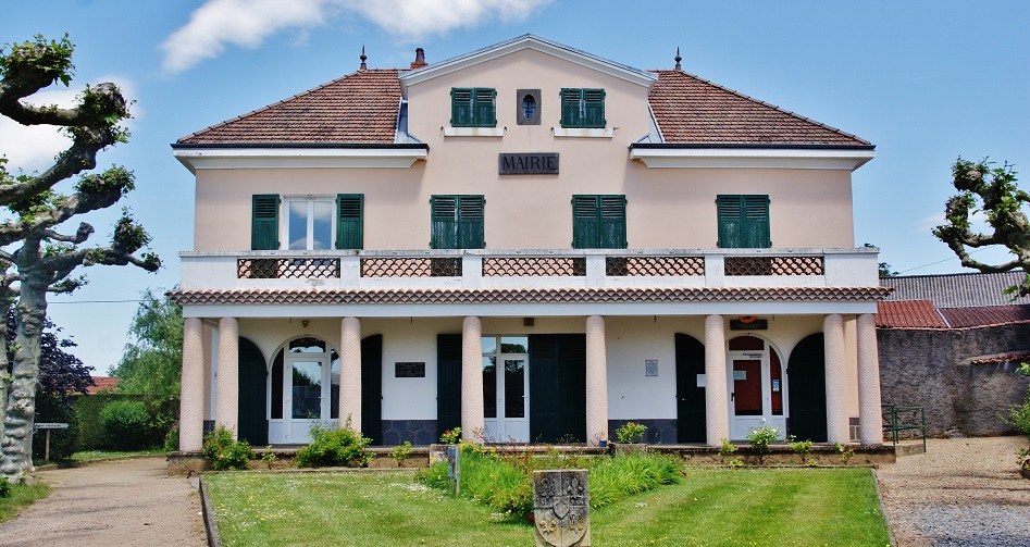 La Mairie. Armes: Écartelé: aux 1er et 4e d'azur à l'étui de crosse d'or, aux 2e et 3e d'or à la fleur de lis de gueules; sur le tout, d'argent au chevron ondé de sable accompagné de trois tourteaux du même.